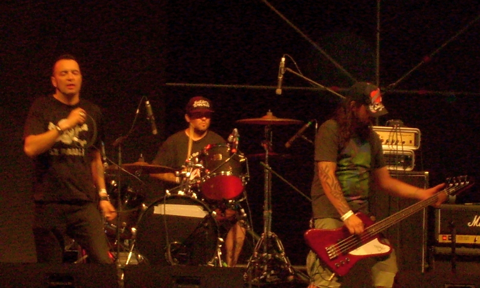 cumbre del rock chileno II